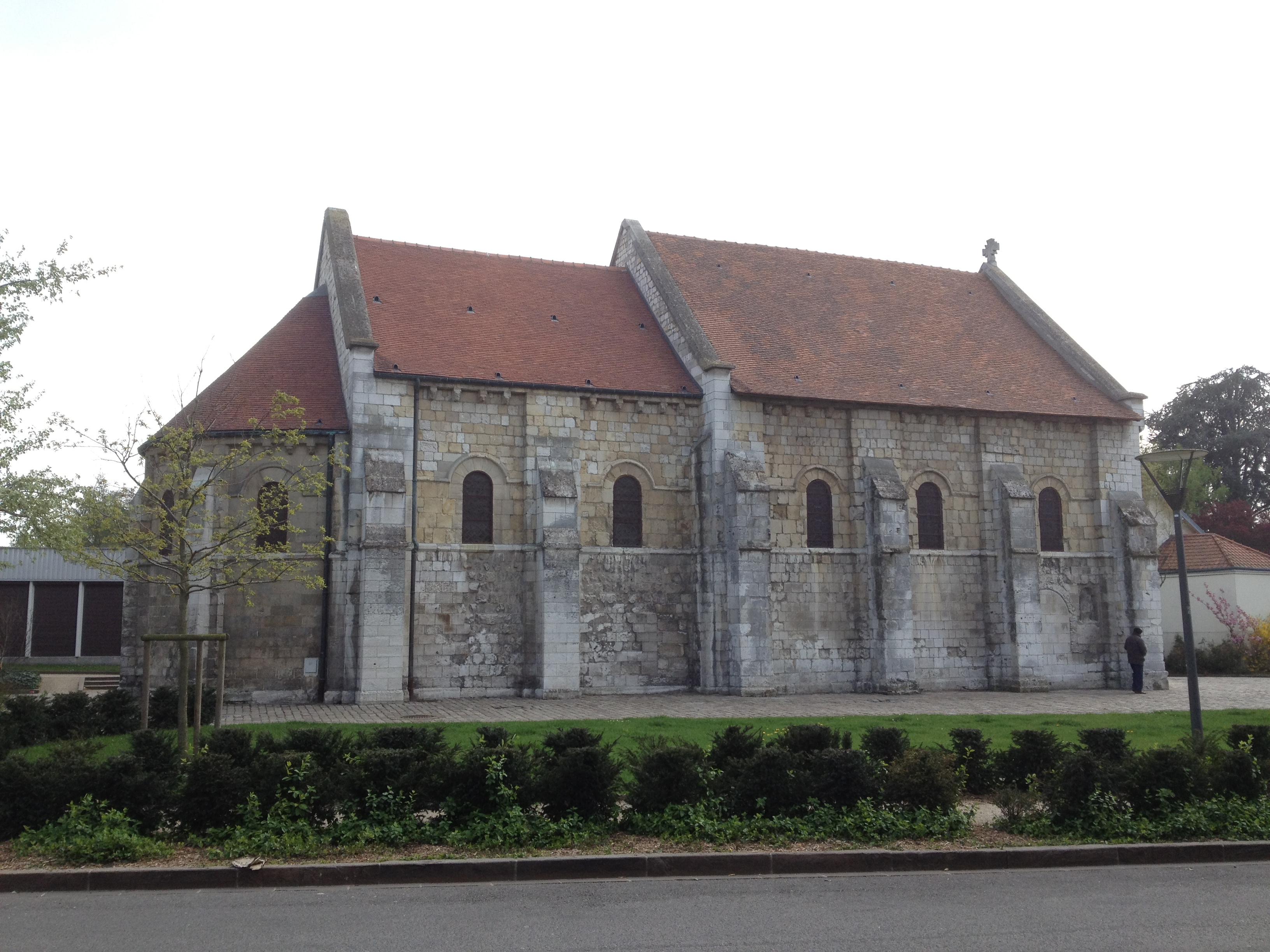 Chapelle Saint-Julien du Petit-Quevilly.